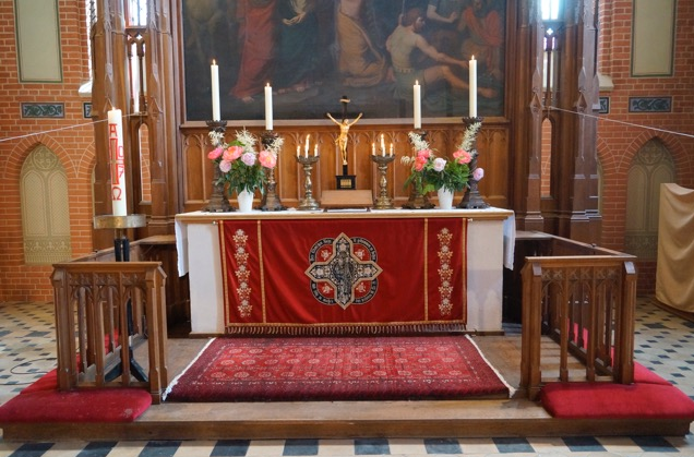 Altar mit rotem Antependium zu Pfingsten in der Plauer St. Marienkriche